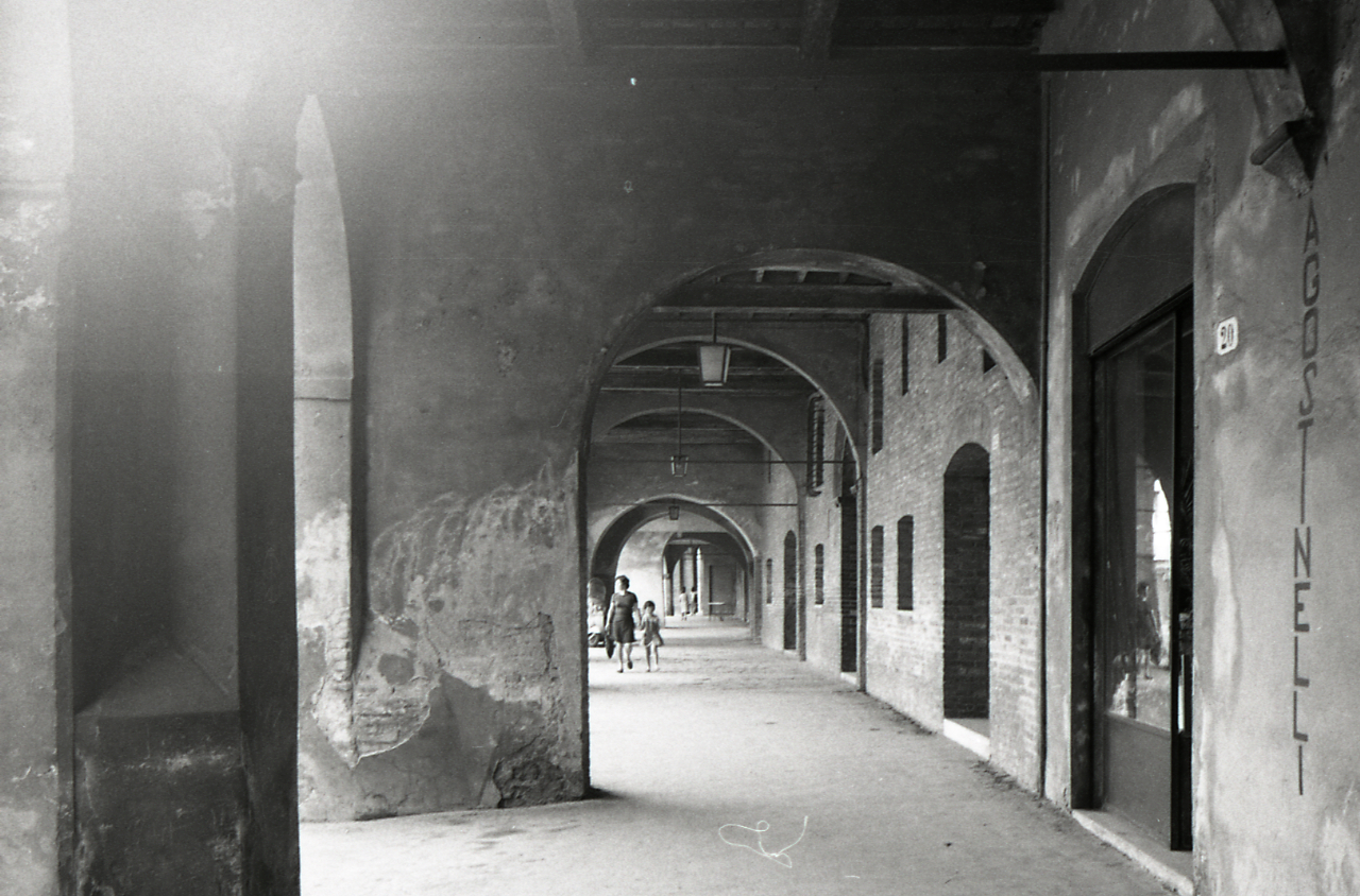 Servizio fotografico : Ferrara, 1974 / Paolo Monti. - Strisce: 7, Fotogrammi complessivi: 36 : Negativo b/n, gelatina bromuro d'argento/ pellicola ; 35 mm. - ((Sul portanegativi: N[I]K[MA]T FP4. - (1):. - 23-37 = portici. - Occasione: Documentazione del centro storico. - Fonte: Agenda di Paolo Monti: Leica 1501-3000 Controllo numerazione (1950-1978), presso Archivio Paolo Monti. - Fonte: Fattura di Paolo Monti: IV. Commesse/ Fattura n. 18/ Riprese fotografiche del centro storico (Mostra Vitalità del centro storico) (1974/10/16), presso Archivio Paolo Monti